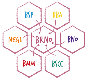 Mestsky ekosystem Brno